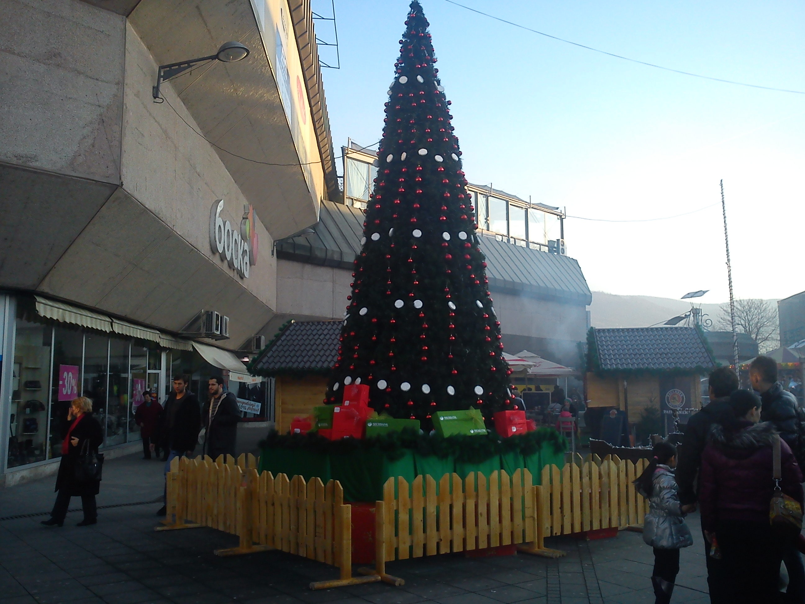 Јелка у Зимзограду, Бања Лука